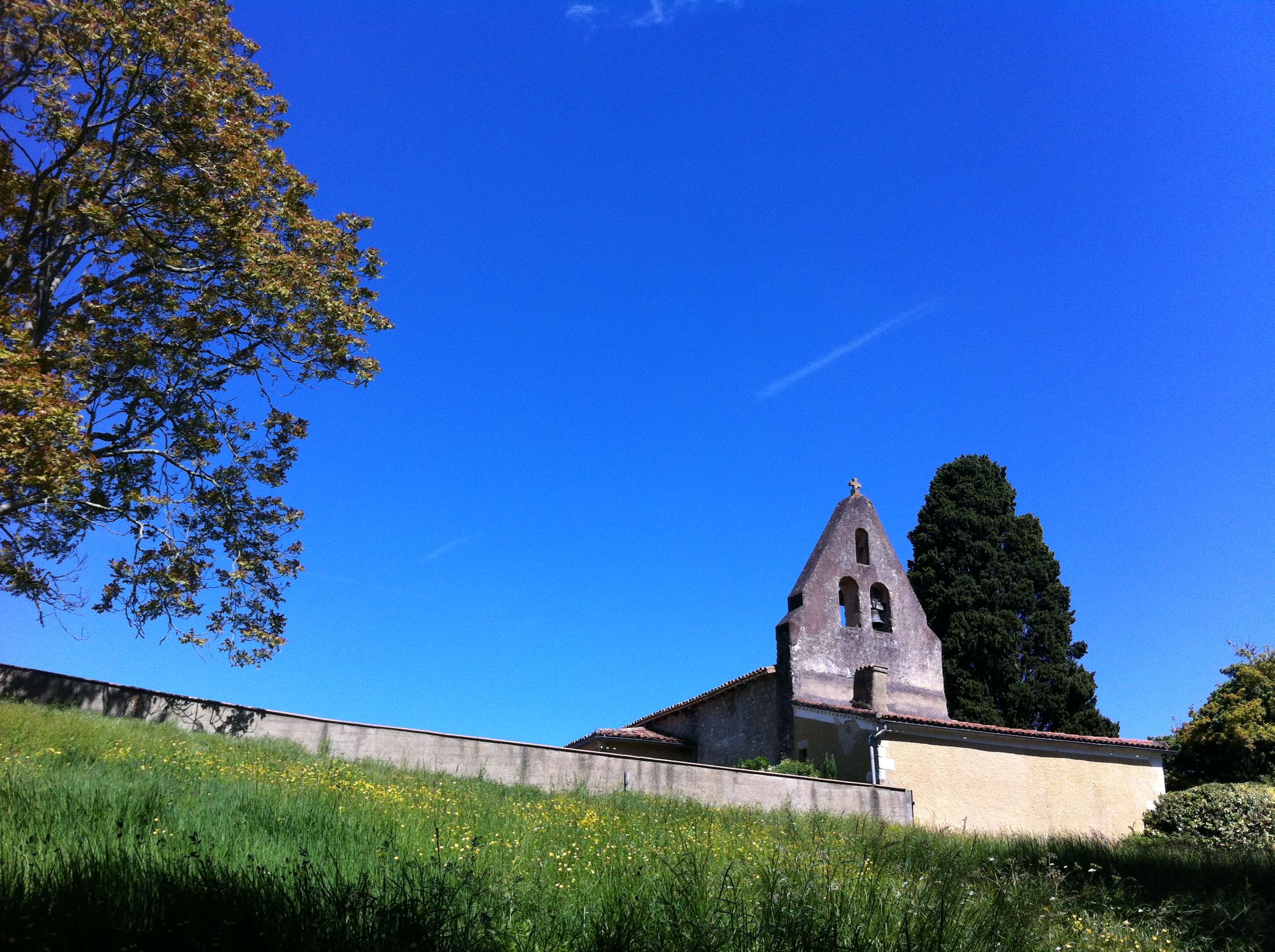 la chapelle de Le Boulin, Gers